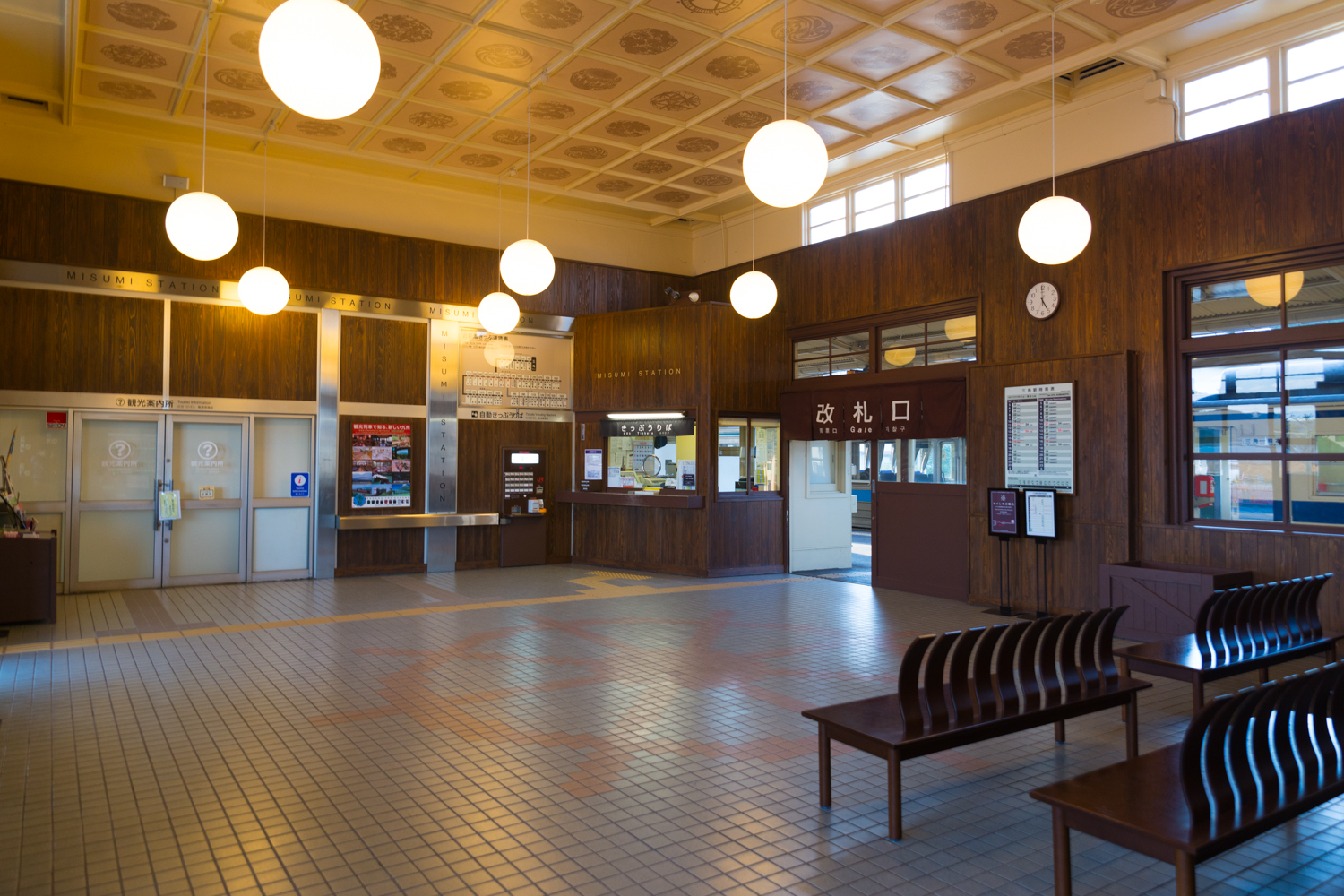 九州旅客鉄道株式会社三角線三角駅駅舎内